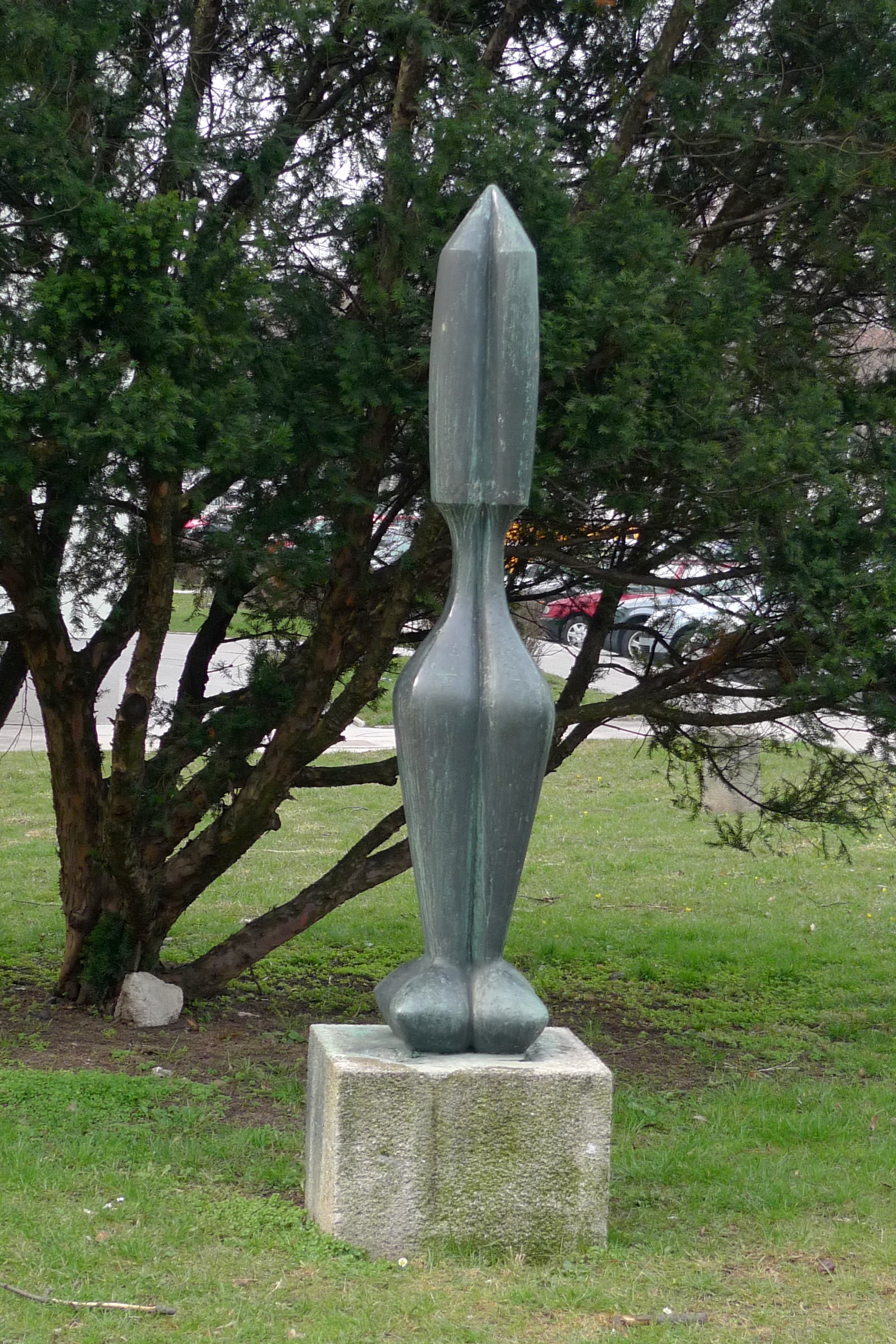 Abstrakte Form von Gertrude Fronius, Gaßmannstraße 1-19 , Meidling. This media shows the Vienna residential building (Gemeindebau) with the ID 910.